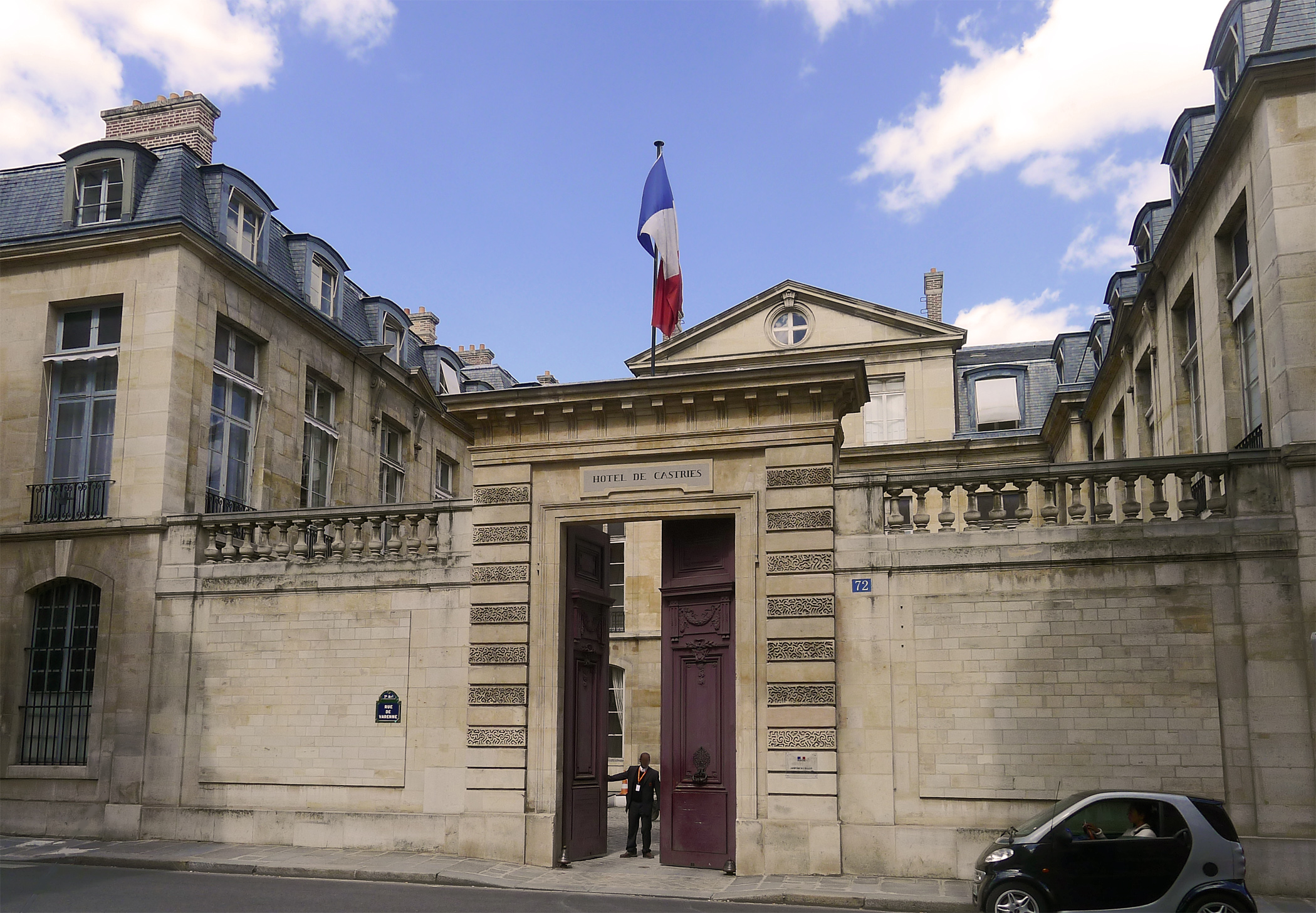 Hôtel de Castries (n°72, rue de Varenne) - Paris VII